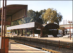 Netanya Platform